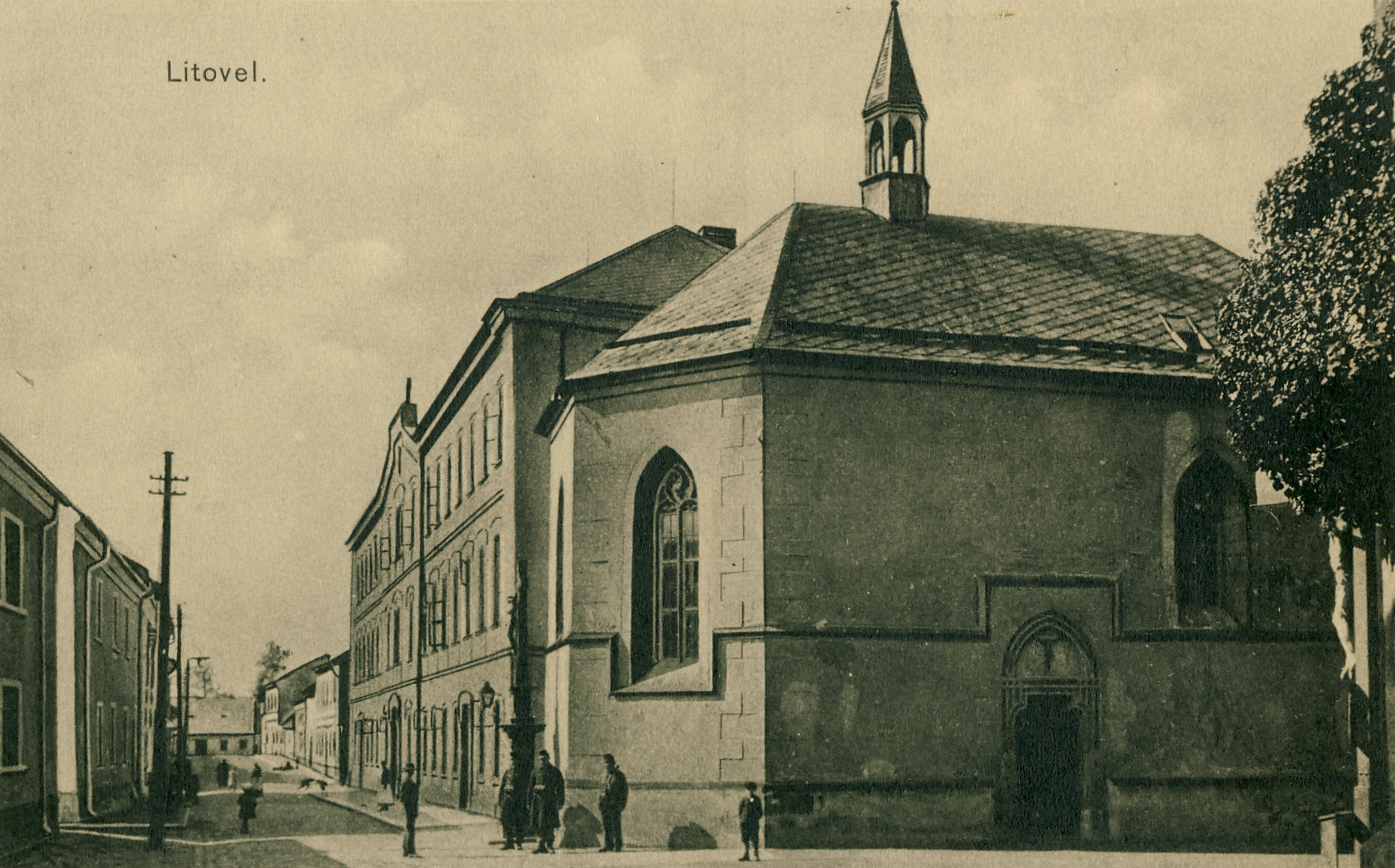 Litovel, kaple svatého Jiří, dobová pohlednice.